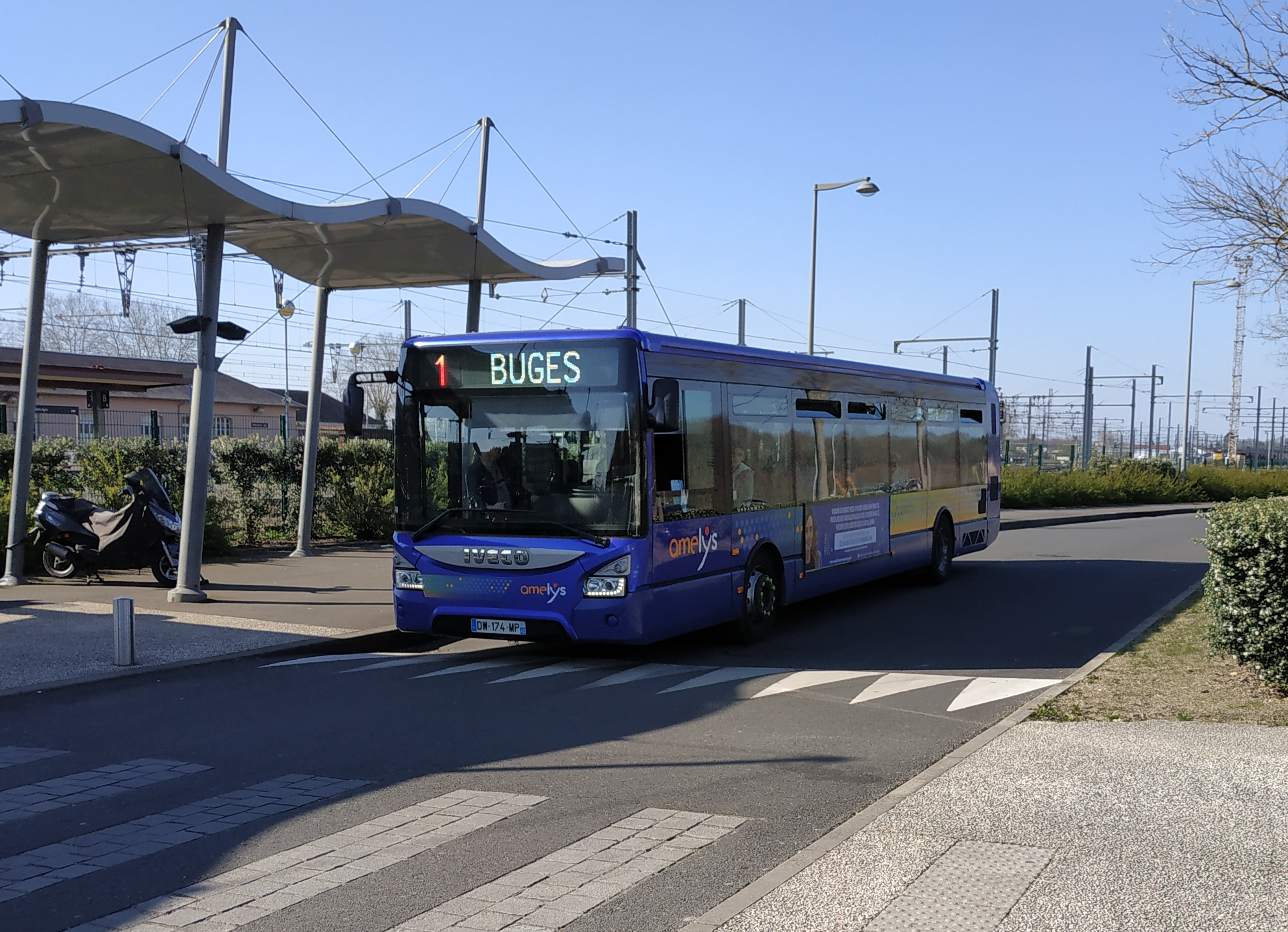 Autobus Iveco Urbanway 12 à la gare de Montargis